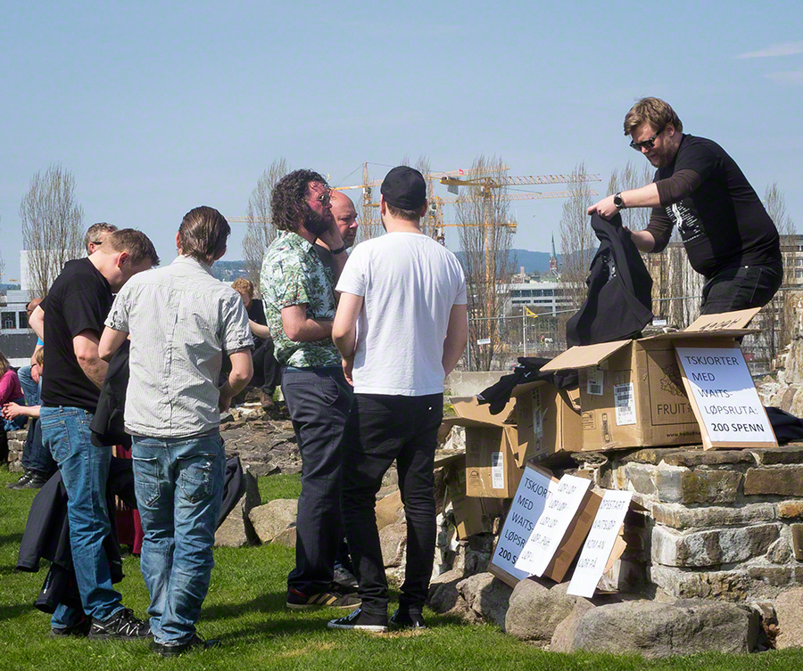 Tom Waits-løpet 2016 startet ved ruinene etter Clemenskirken. Her fikk deltakere mulighet til å kjøpe en T-skjorte med årets løype og navn på stoppestedene.